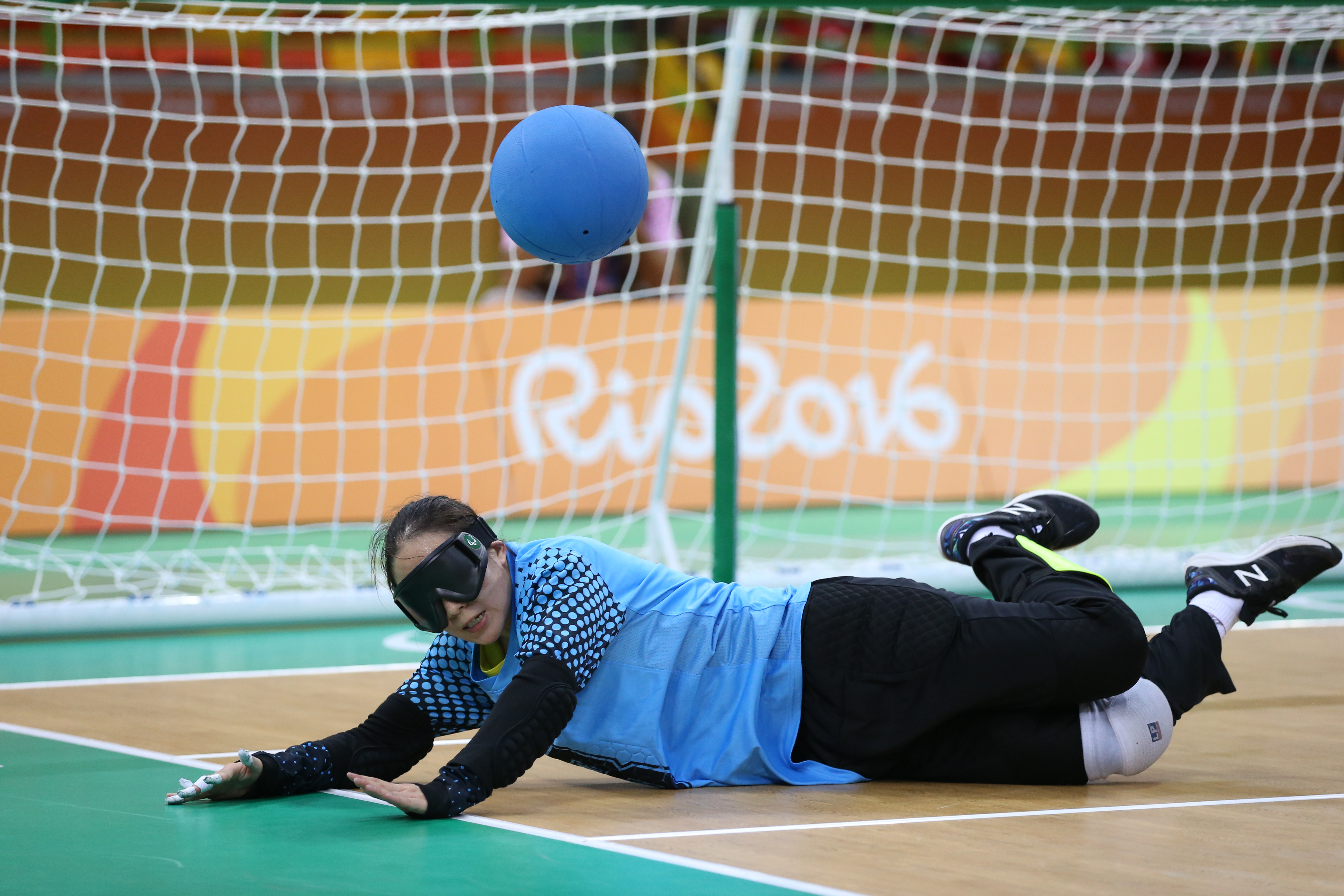 Rio de Janeiro - Brasil perde para a China na prorrogação da semifinal do Goalball feminino das Paralimpíadas Rio 2016 (Tânia Rêgo/Agência Brasil)